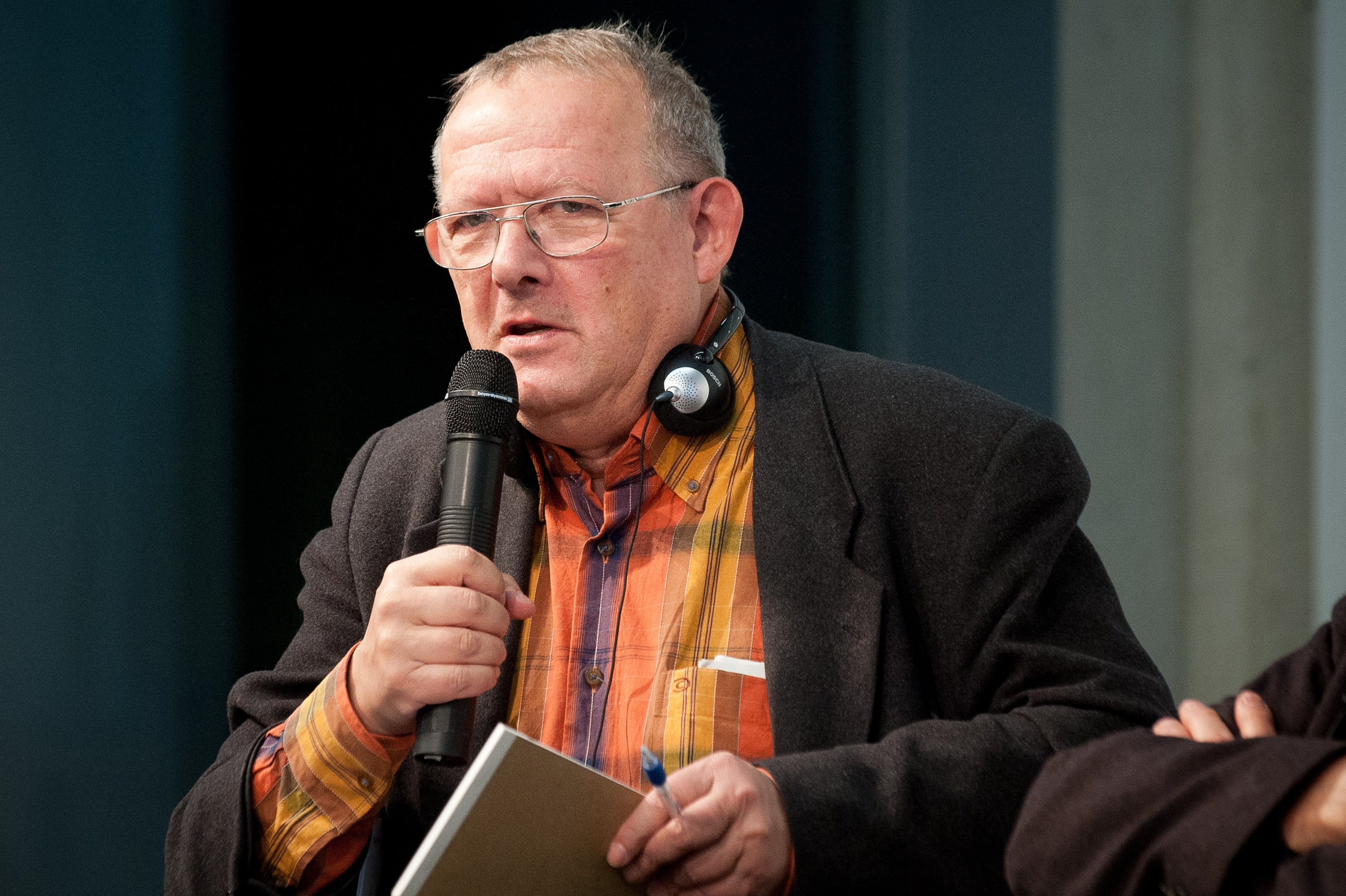 Adam Michnik, (Essayist und Publizist) Foto: Stephan Röhl Podiumsdiskussion „Mehr Europa wagen. Eine Intervention“. Heinrich-Böll-Stiftung in Kooperation mit dem Institut Français Berlin Mit André Glucksmann, Philosoph und Publizist Adam Michnik, Essayist und Publizist Peter Schneider, Schriftsteller Daniela Schwarzer, Stiftung Wissenschaft und Politik Moderation: Ralf Fücks, Vorstand, Heinrich-Böll-Stiftung